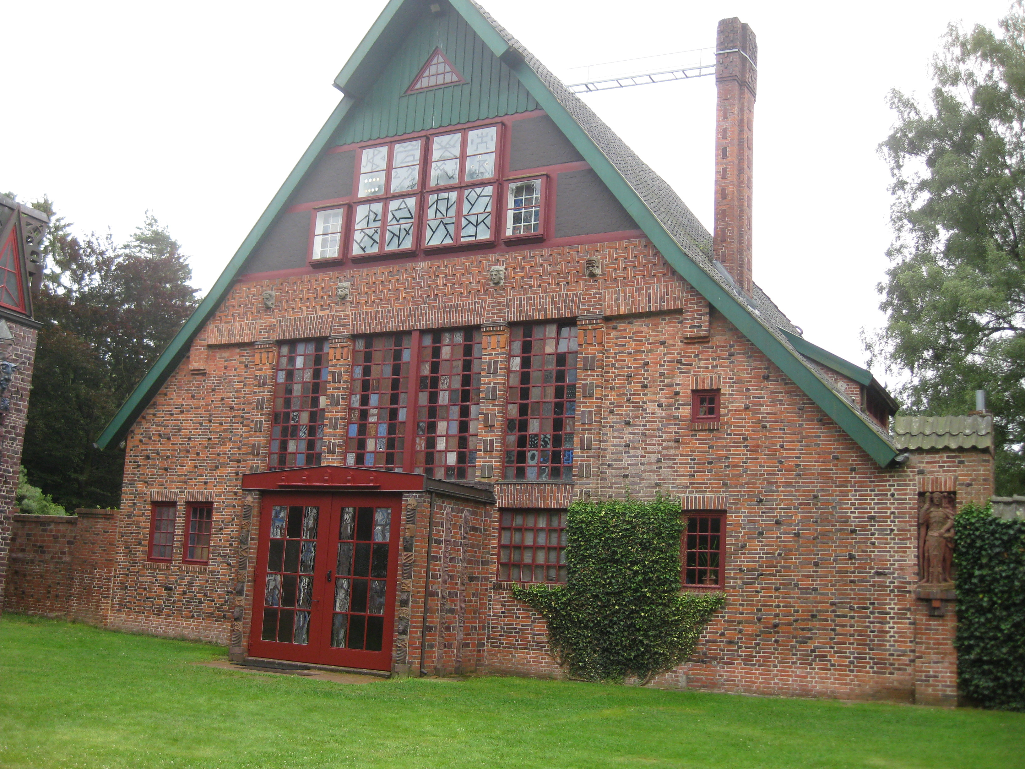 Wohnung und Atelierräume des Künstlerehepaars Bossard in der Lüneburger Heide, heute öffentliches Museum